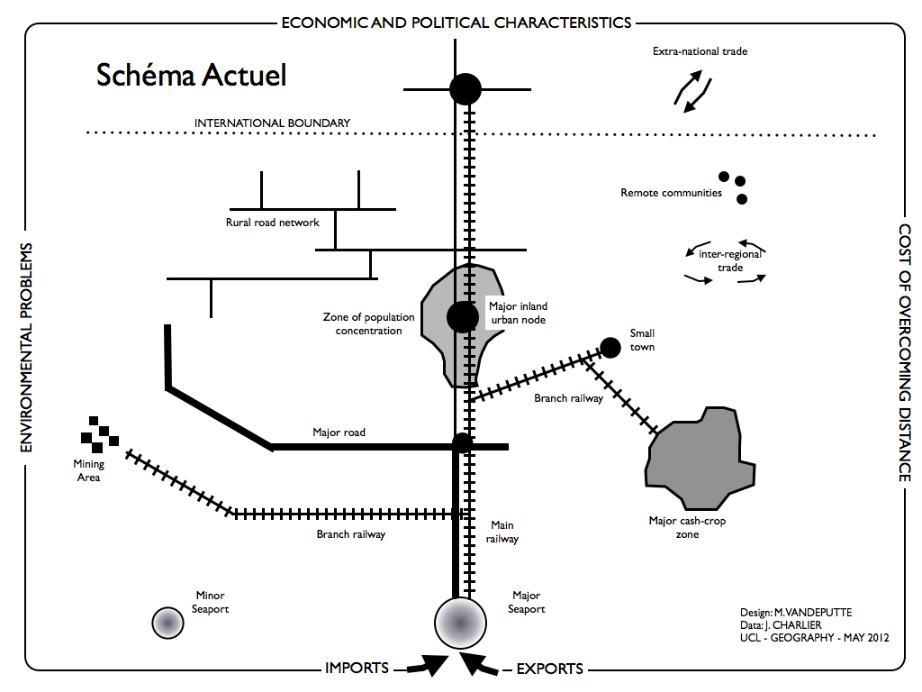 Schéma de développement d'un réseau de transport en Afrique Centrale